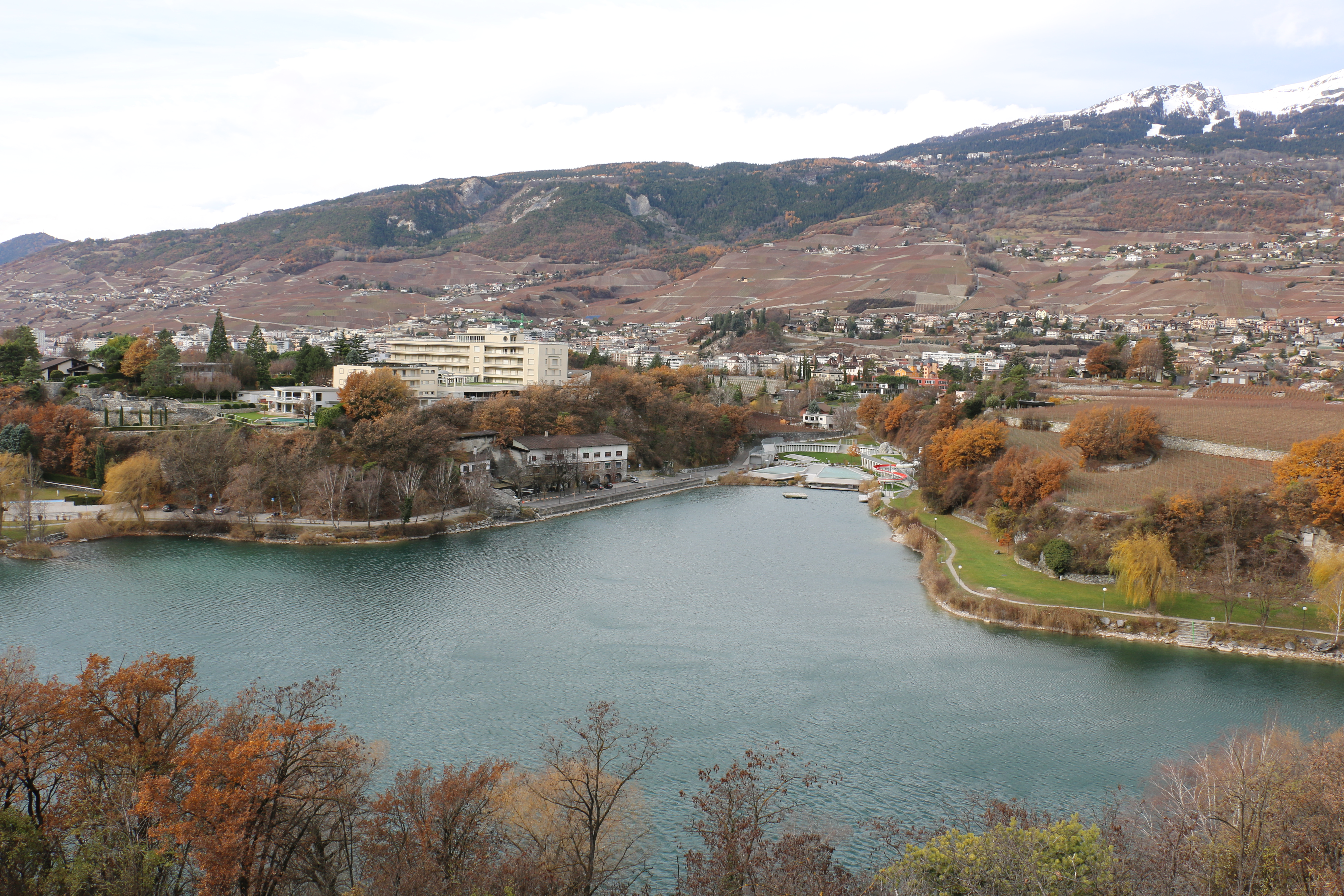 Lac de Géronde